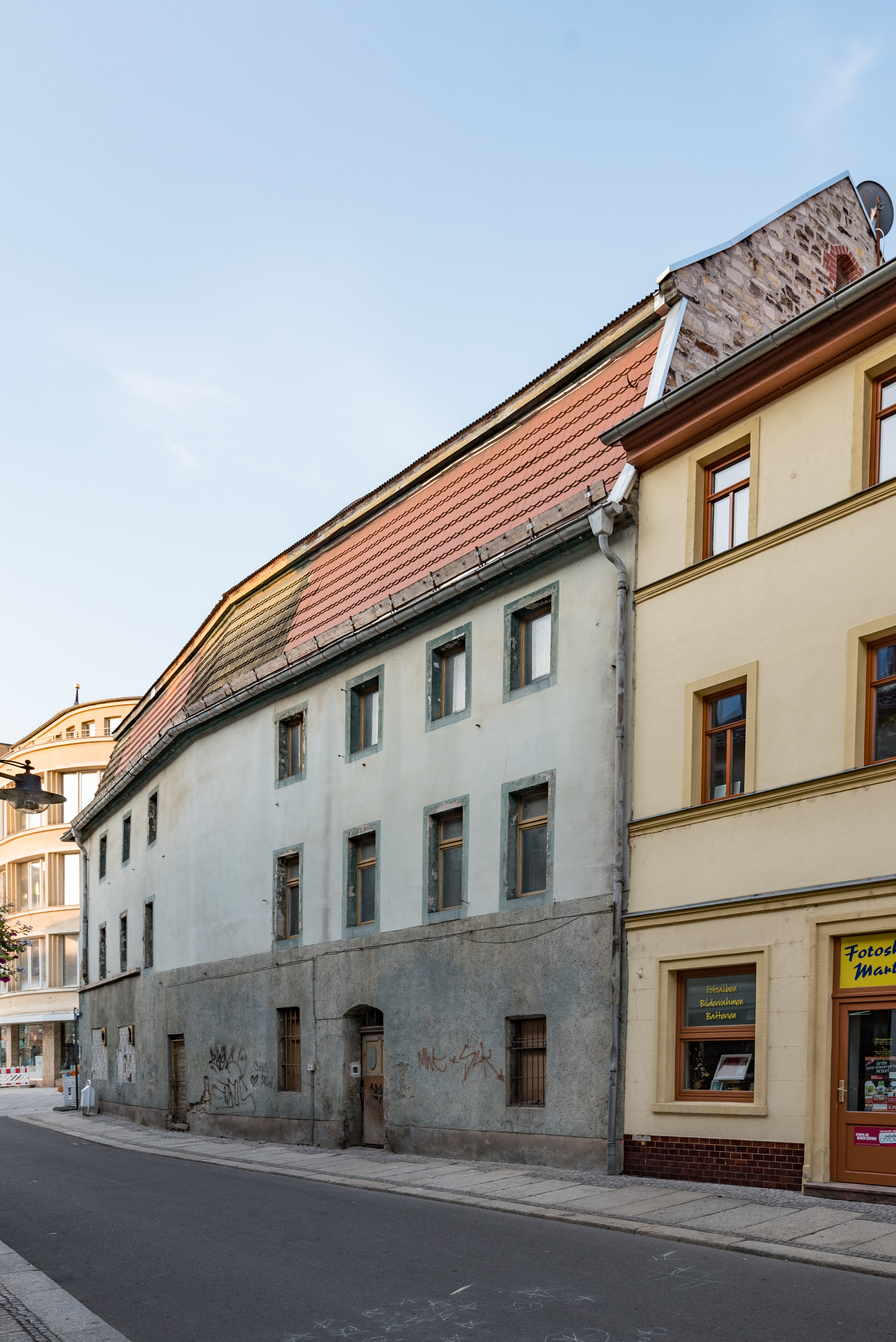 Weißenfels, Kleine Kalandstraße 2